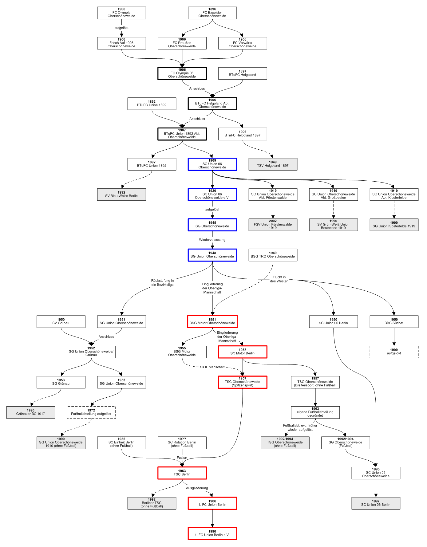 grafische Darstellung der Namens- und Vereinshistorie des 1. FC Union Berlin